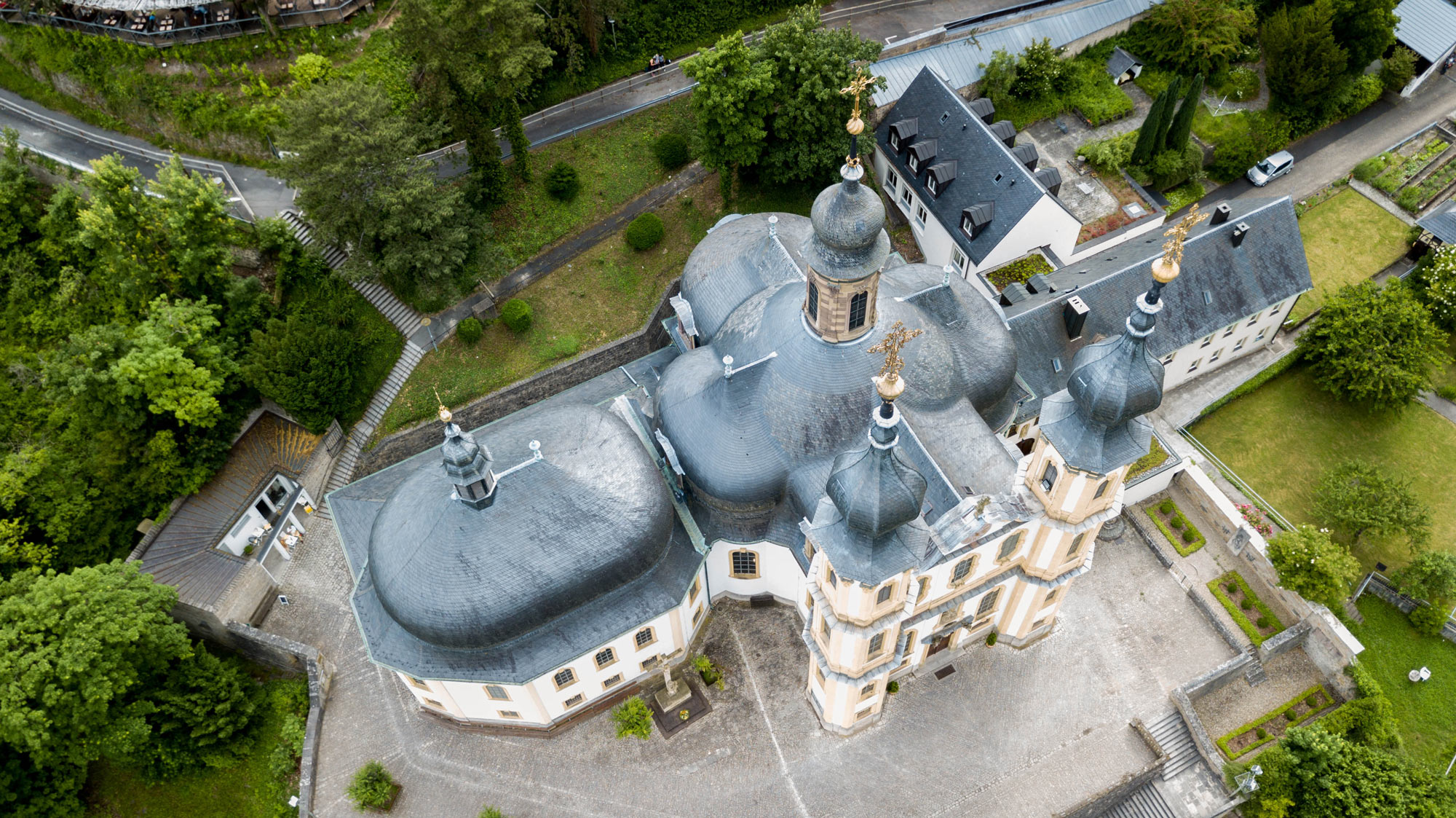 Luftbildaufnahme der Kapelle aus leicht östlicher Richtung. Ihr offizieller Name ist Wallfahrtskirche Mariä Heimsuchung in Würzburg.